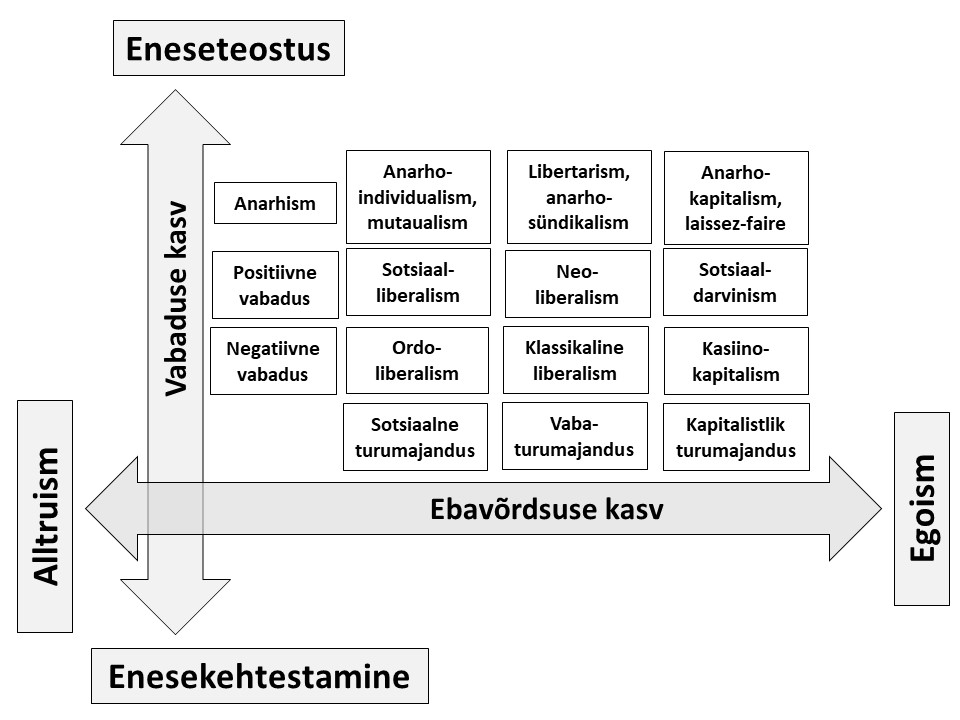 Paigutab turumajanduse ideoloogiad süsteemi